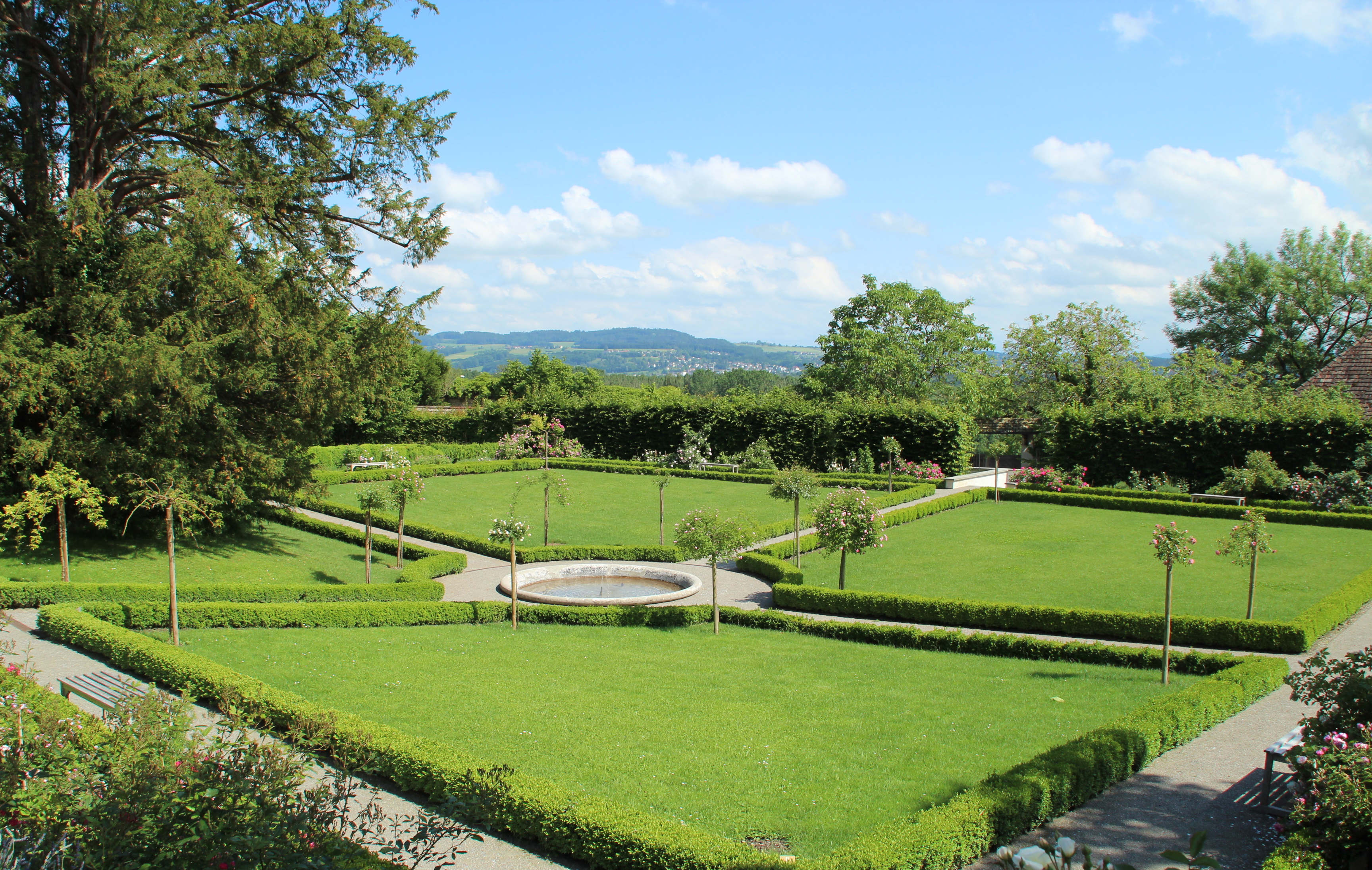 Kartause Ittingen Park